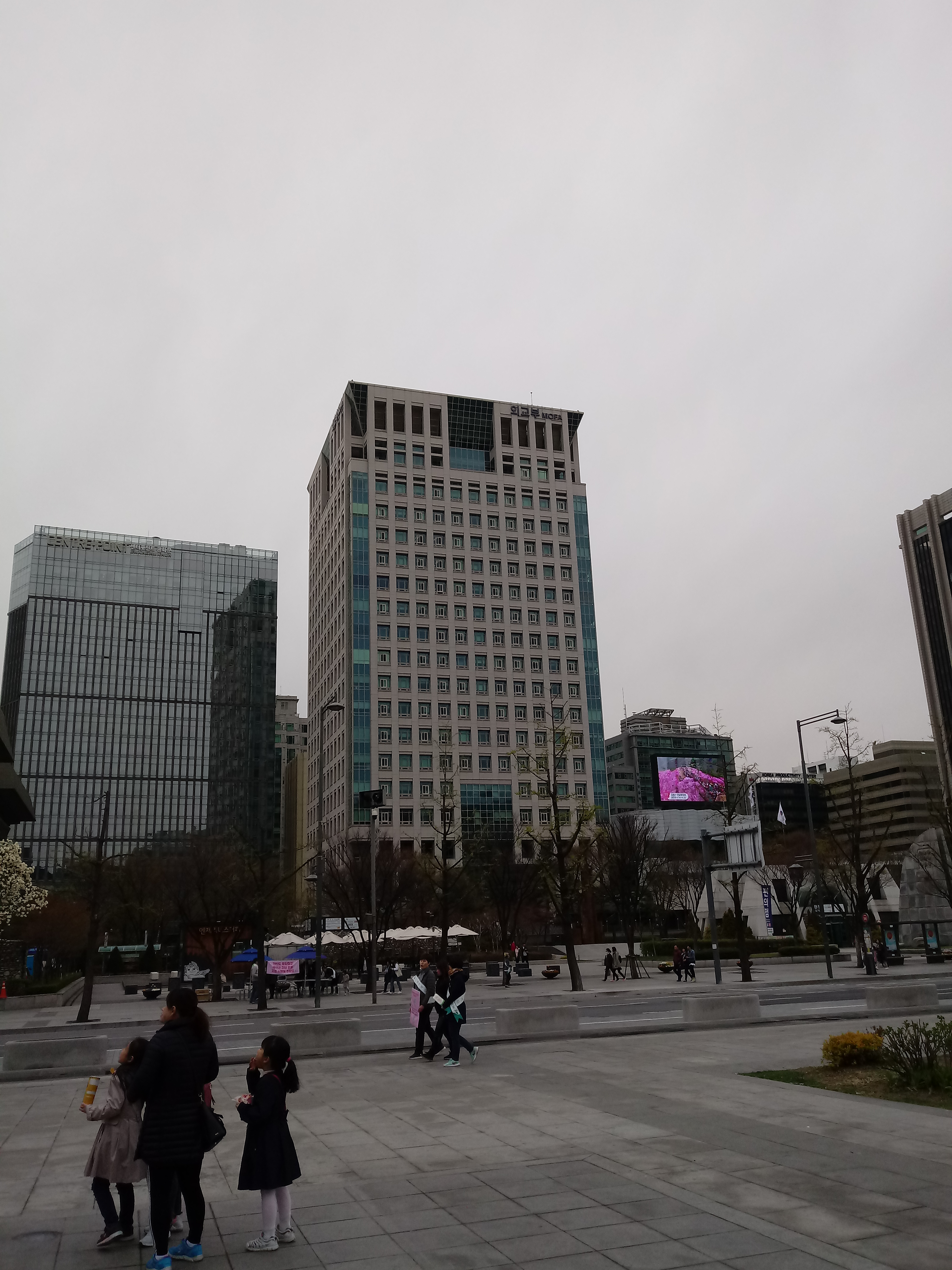 대한민국 외교부